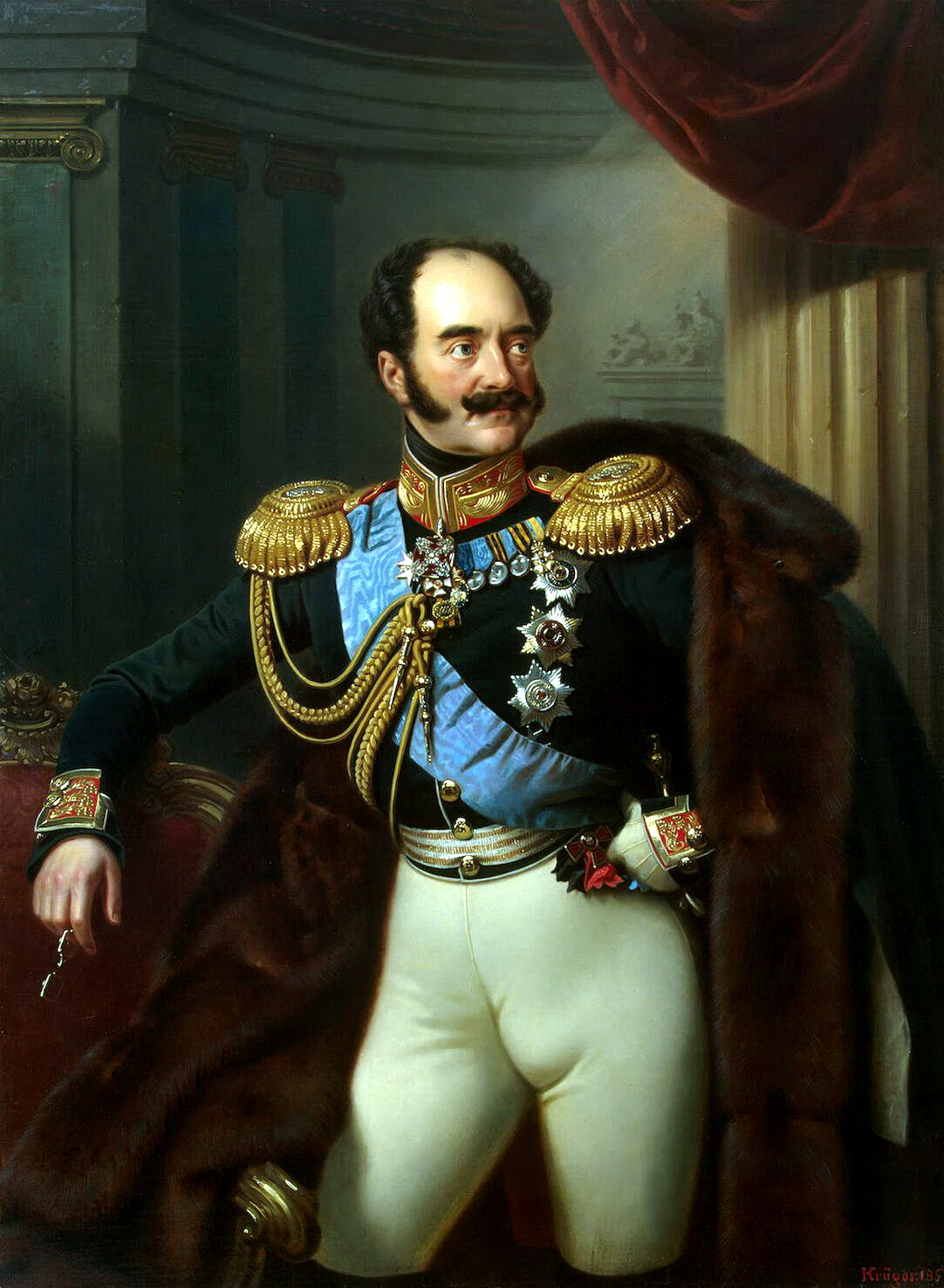 Граф Владимир Фёдорович Адлерберг 1-й (1791—1884) — приближённый Николая I, генерал от инфантерии, генерал-адъютант, в 1852-70 годах — министр двора и уделов. Брат статс-дамы Ю. Ф. Барановой: имя при рождении: Эдуард Фердинанд Вольдемар фон Адлерберг, или Эдвард Фердинанд Вольдемар Адлерберг нем.: Eduard Ferdinand Woldemar von Adlerberg (Porträt von Franz Krüger - 1851) швед.: Edvard Ferdinand Voldemar Adlerberg py-aнгл. pоманизатция: Graf Vladimir Fyodorovich Adleberg I